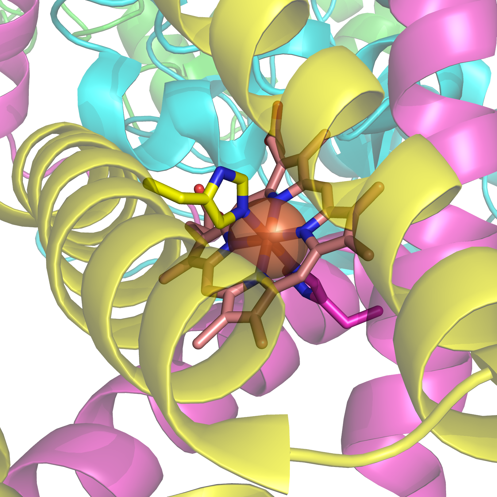 By Richard Wheeler (Zephyris) 2006.